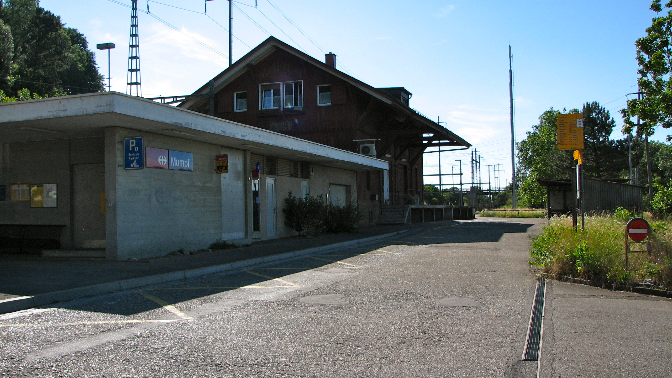 Bahnhof Mumpf AG, Schweiz